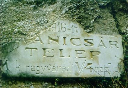 Spominska plošča pri vasi Avče.